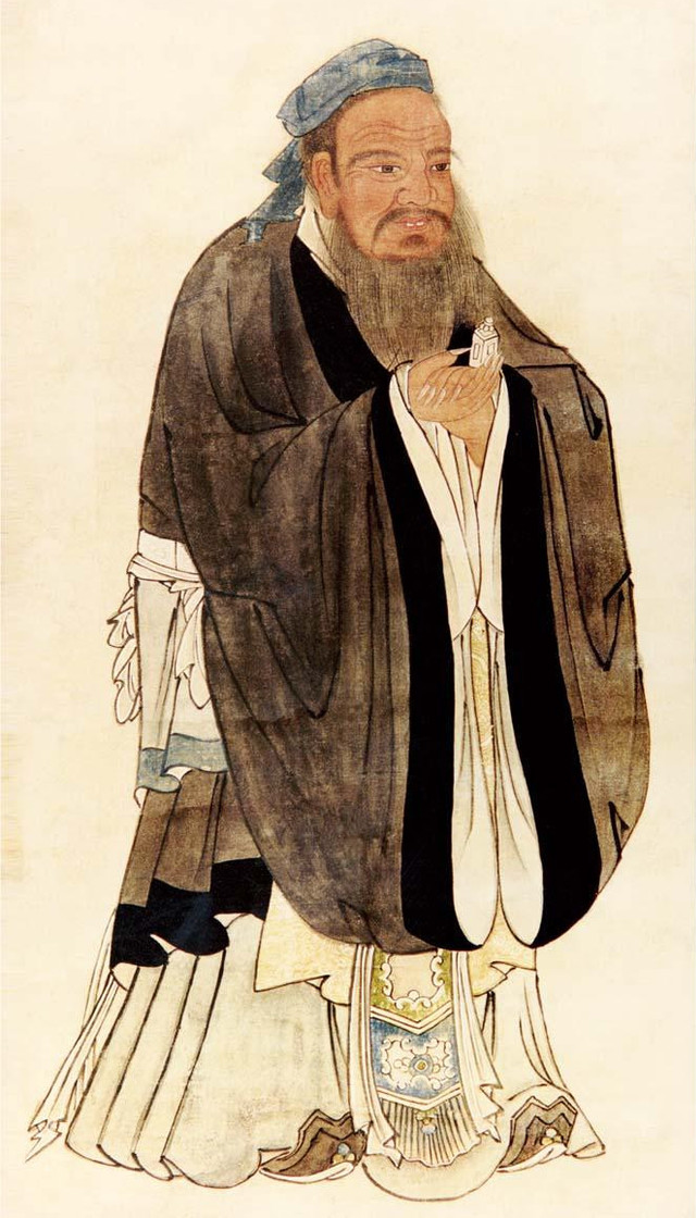 孔子聖蹟圖